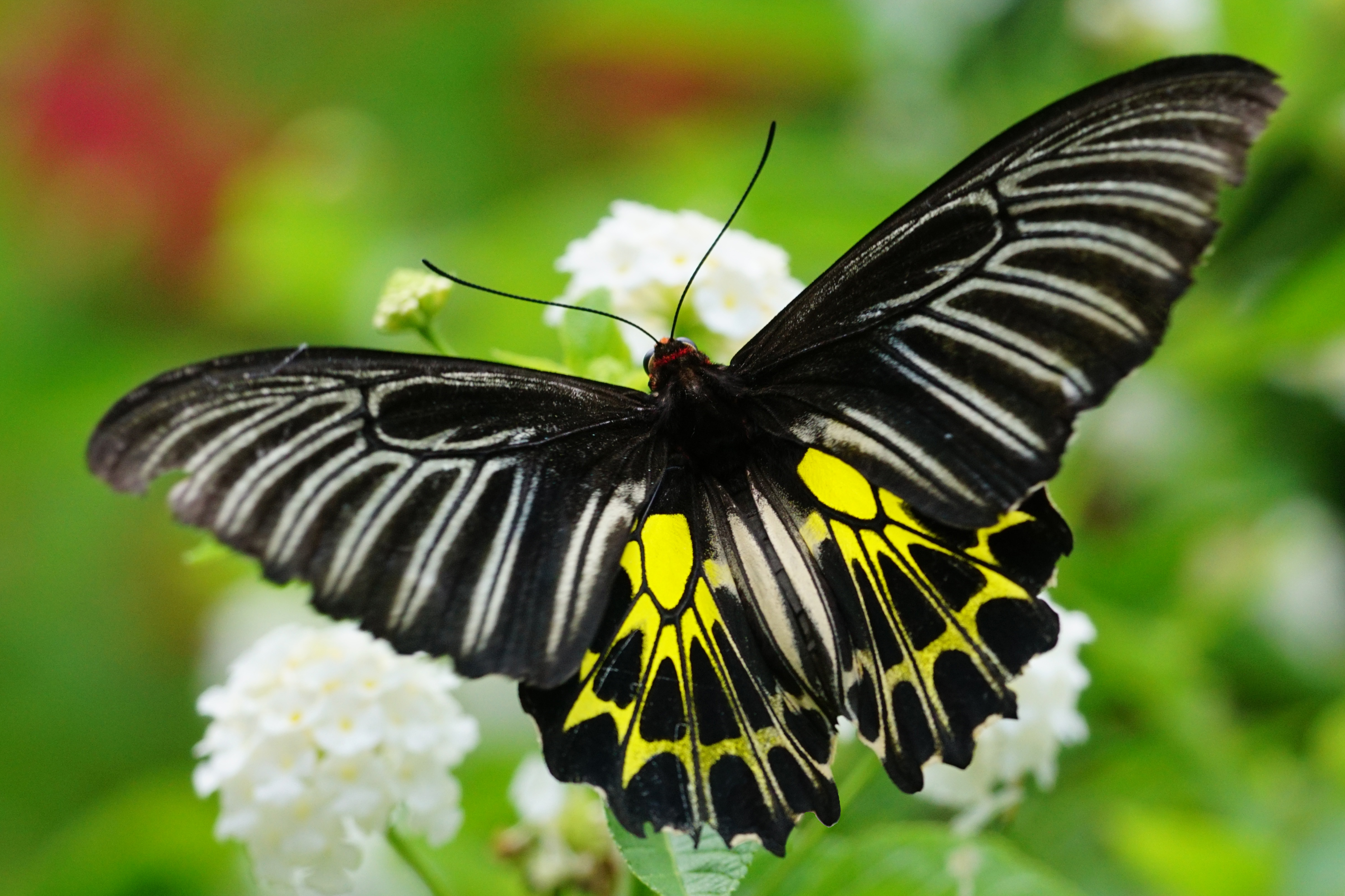 黃裳鳳蝶 Troides aeacus formosanus 雌